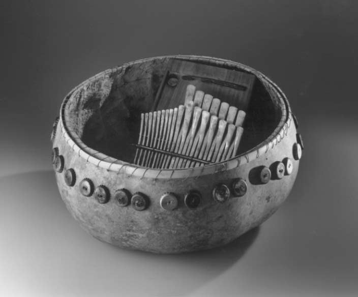 La M'ibra Dzavadzimu, uno strumento musicale tradizionale dello Zimbabwe, è costruita con una tavola di legno dell’albero MUKWA. Le 24 chiavi di metallo sono tratte da sottili verghe di ferro ad alto contenuto di carbonio. Lo strumento è fissato all’interno di grosse zucche che fungono da cassa di risonanza (con un effetto caratteristico di sostegno del suono).